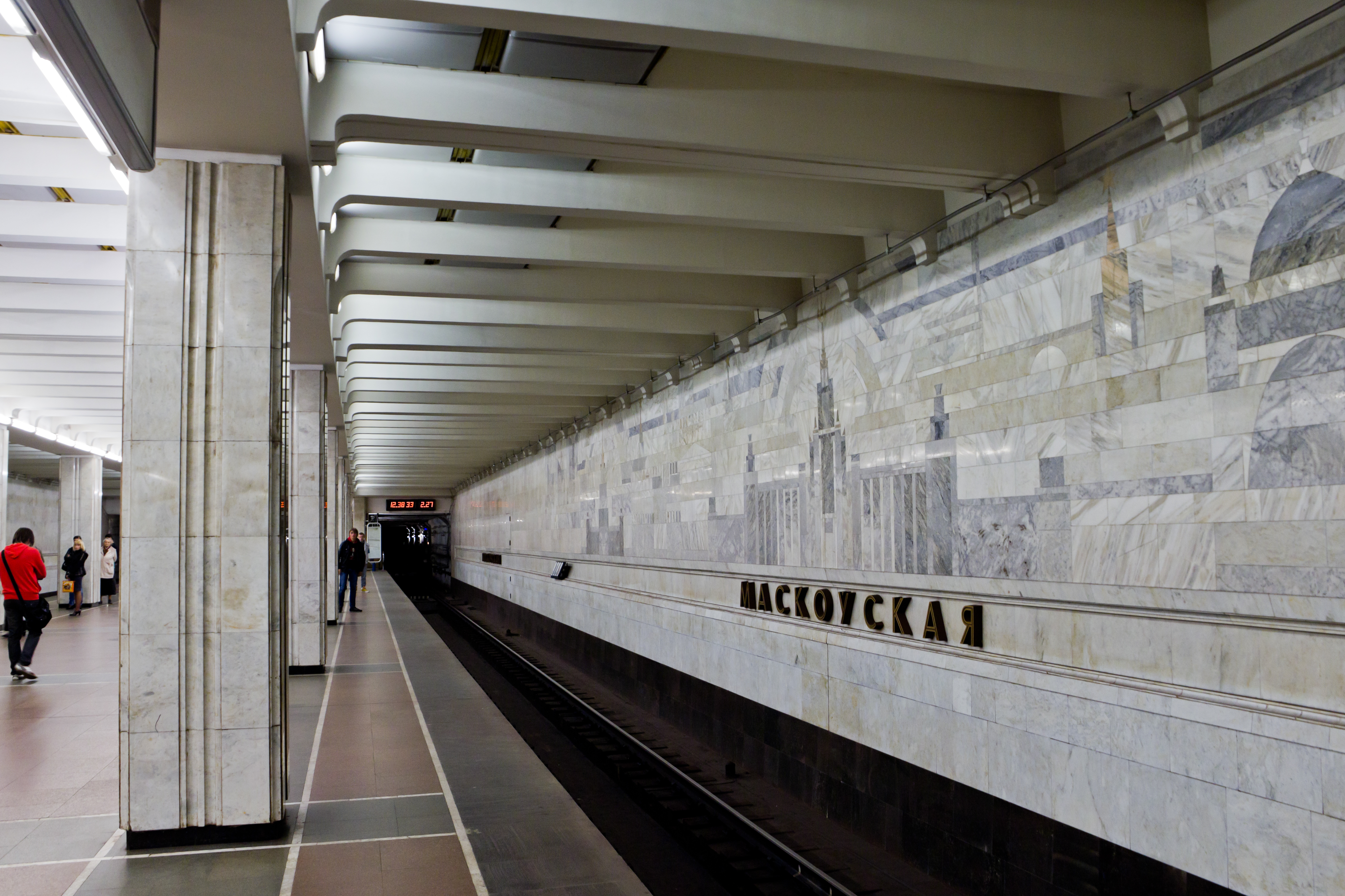 Станция метро «Московская», Минск